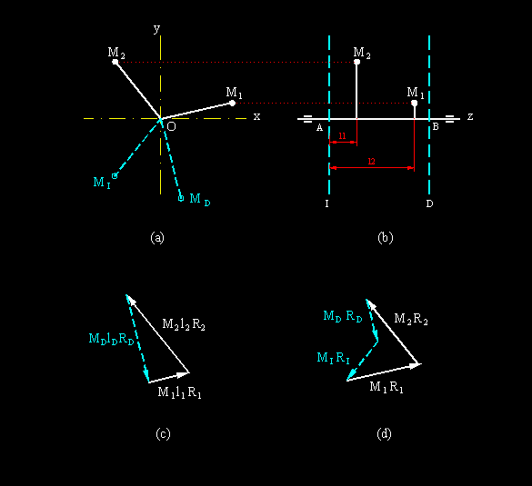 análisis gráfico para el equilibrado dinámico de ejes